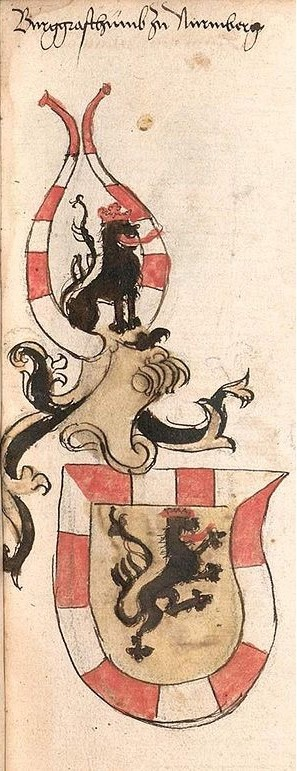 Wappen des Burggraftums Nürnberg